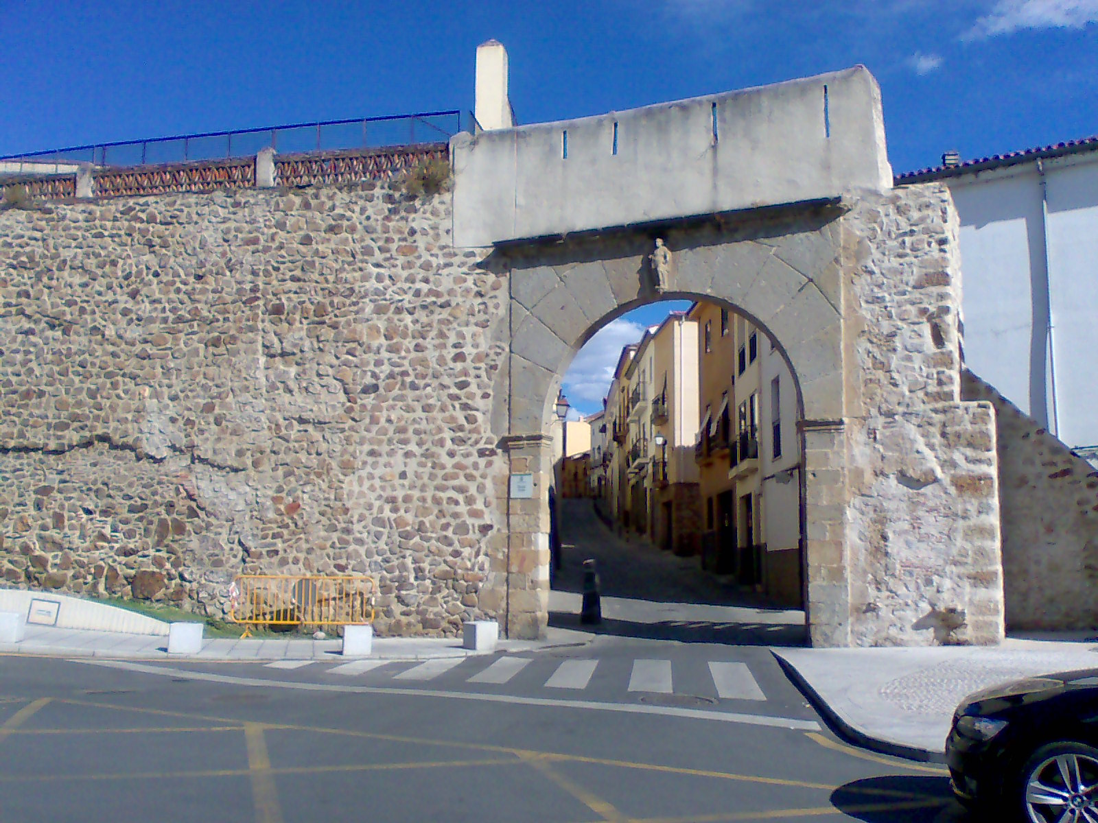 Pueta de Coria Plasencia